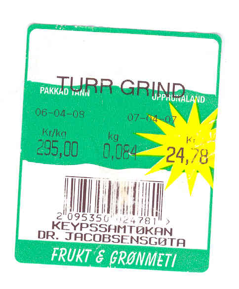 etiquette collé sur le paquet enveloppant un morceau de Grindehval acheté en magasin aux iles Féroé (DK)